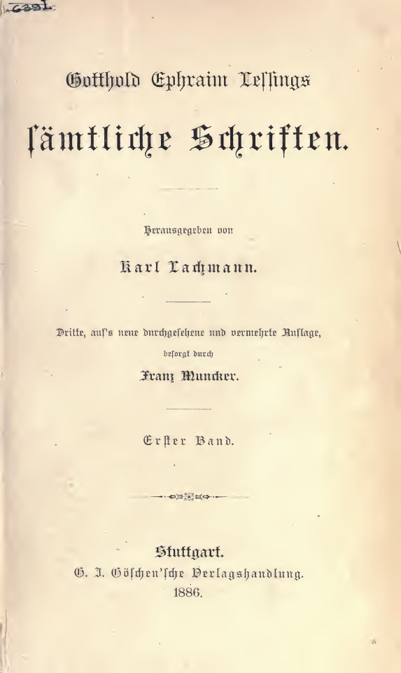 Gotthold Ephraim Lessings Sämtliche Schriften. 1 / herausgegeben von Karl Lachmann. - Stuttgart : G. J. Goschen'sche Verlagshandlung, 1886. - XXIX, 411 p. .